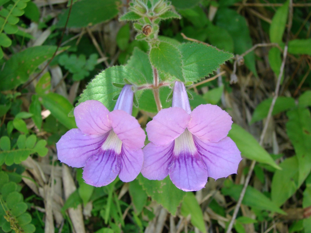 Mandirola multiflora (Gardner) Decne. (Sin. het. Gloxinia hirsuta Lindl. e Gloxinia planalta Wiehler) - Espécie endêmica do Cerrado com citação nova para o DF - GESNERIACEAE - Poço Azul - Brazlândia - Distrito Federal - Brasil.